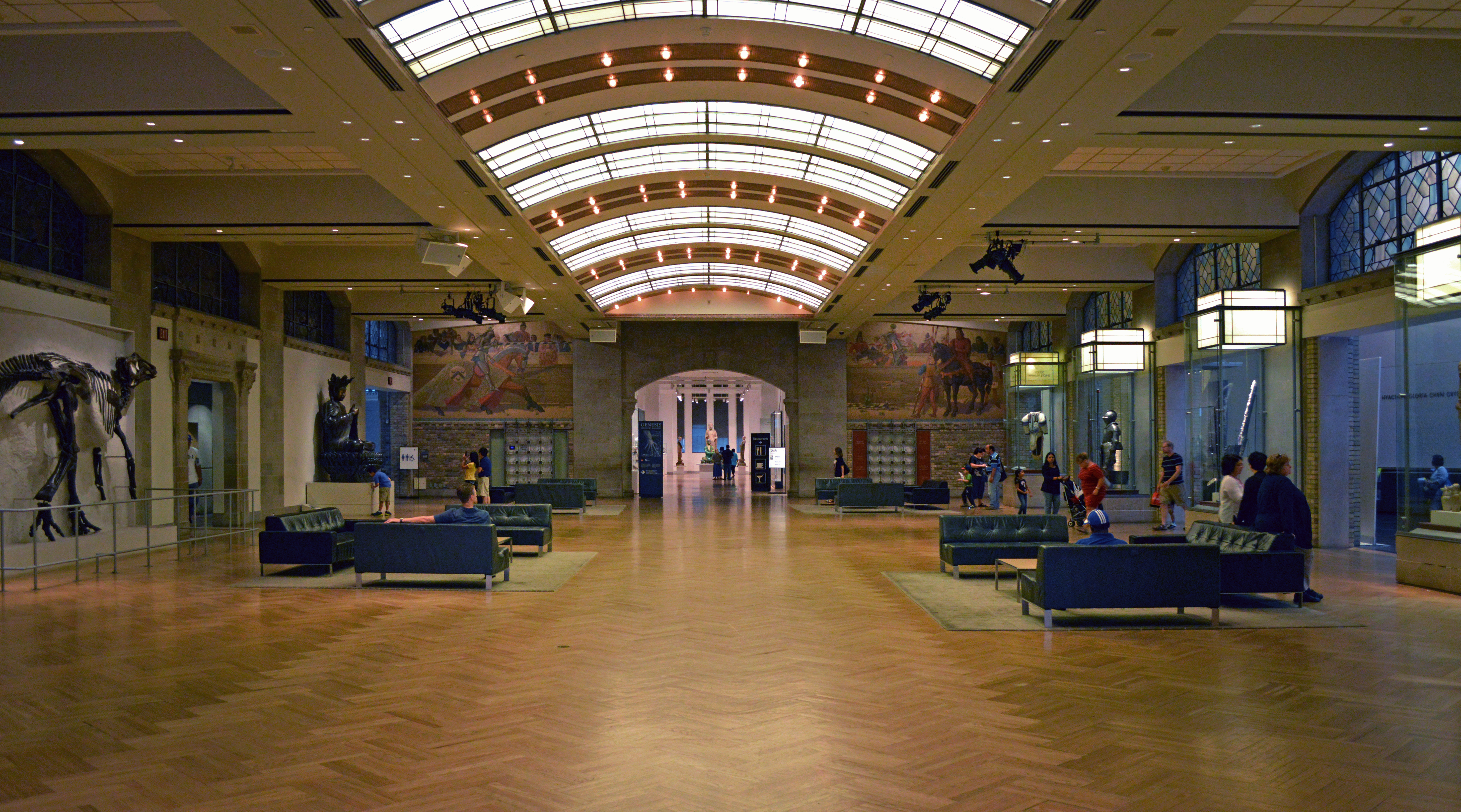 ROM - Royal Ontario Museum, Toronto, Ontario, Canada